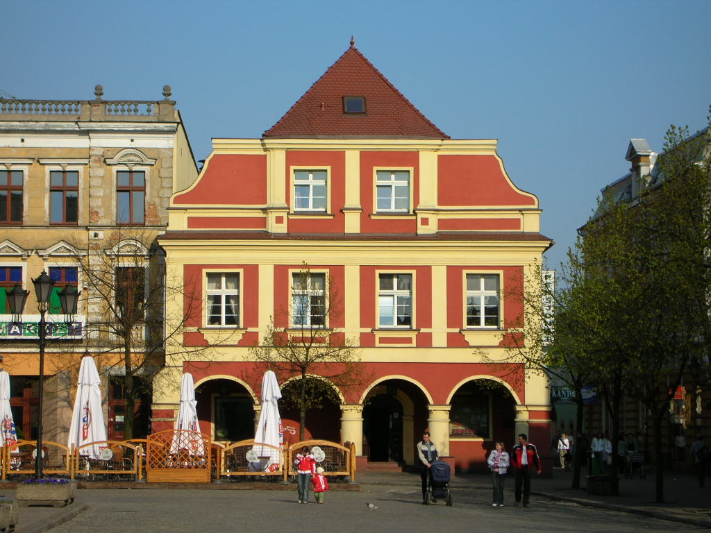 Leszno, Rynek 29 - dom z XVII w. (zabytek nr 188/2/A)